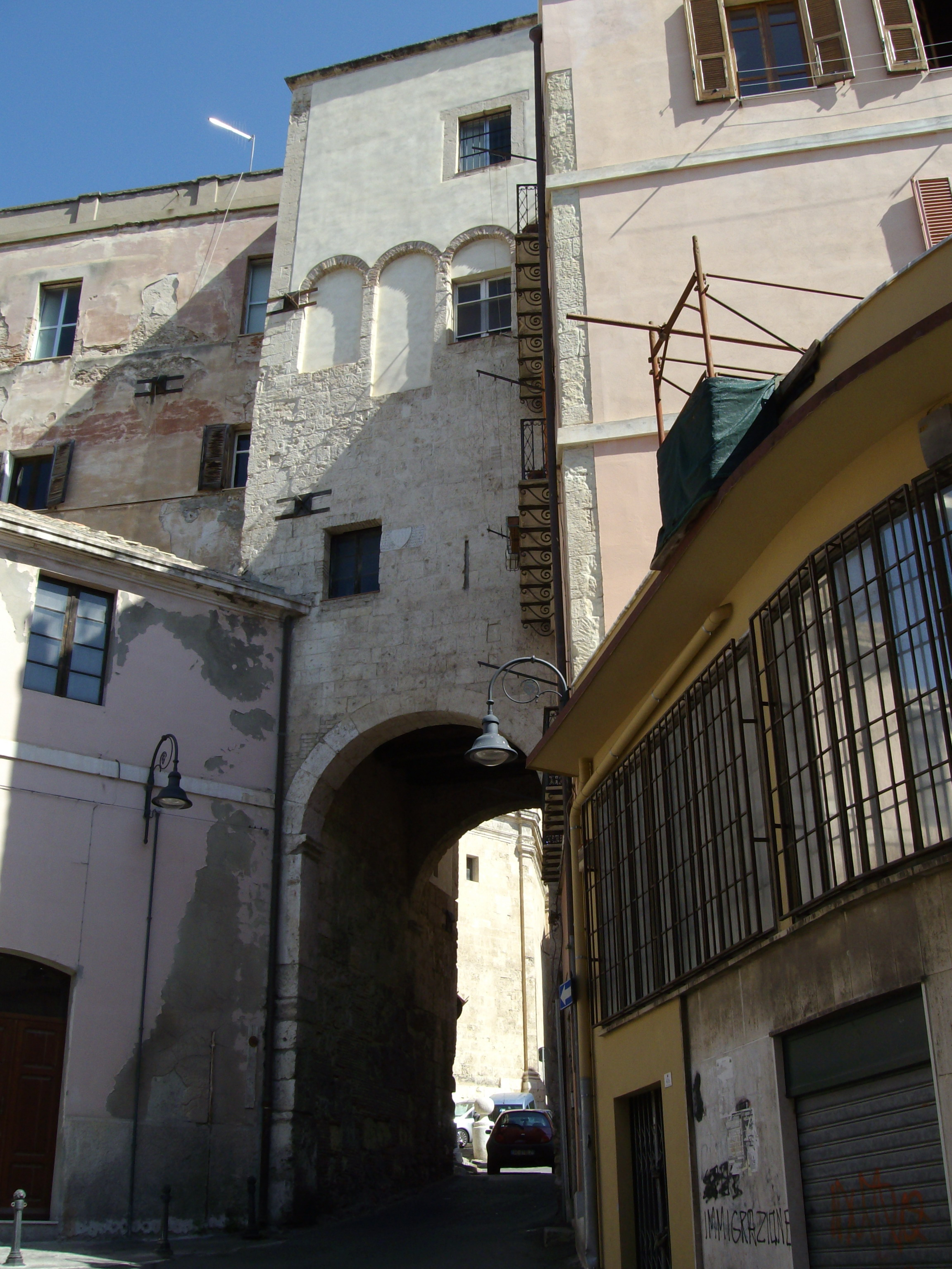 Torre e portico dello Sperone (XIII secolo) a Cagliari